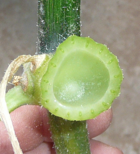 Fortín Olavarría, Buenos Aires province, Argentina.